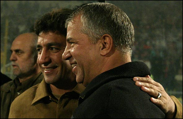 گزارش نیمه اول گزارش نیمه دوم